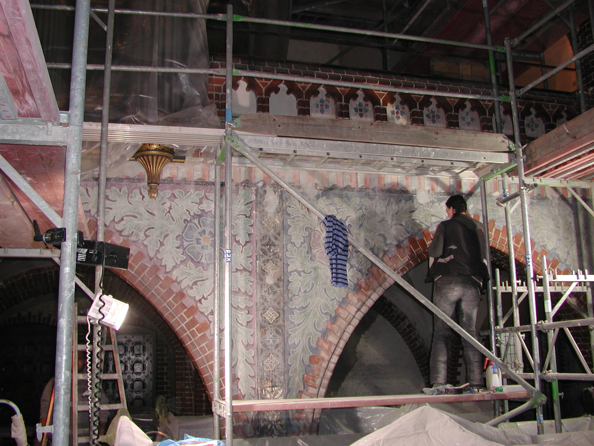 Restaurierungsarbeiten in der Erlöserkirche 2007